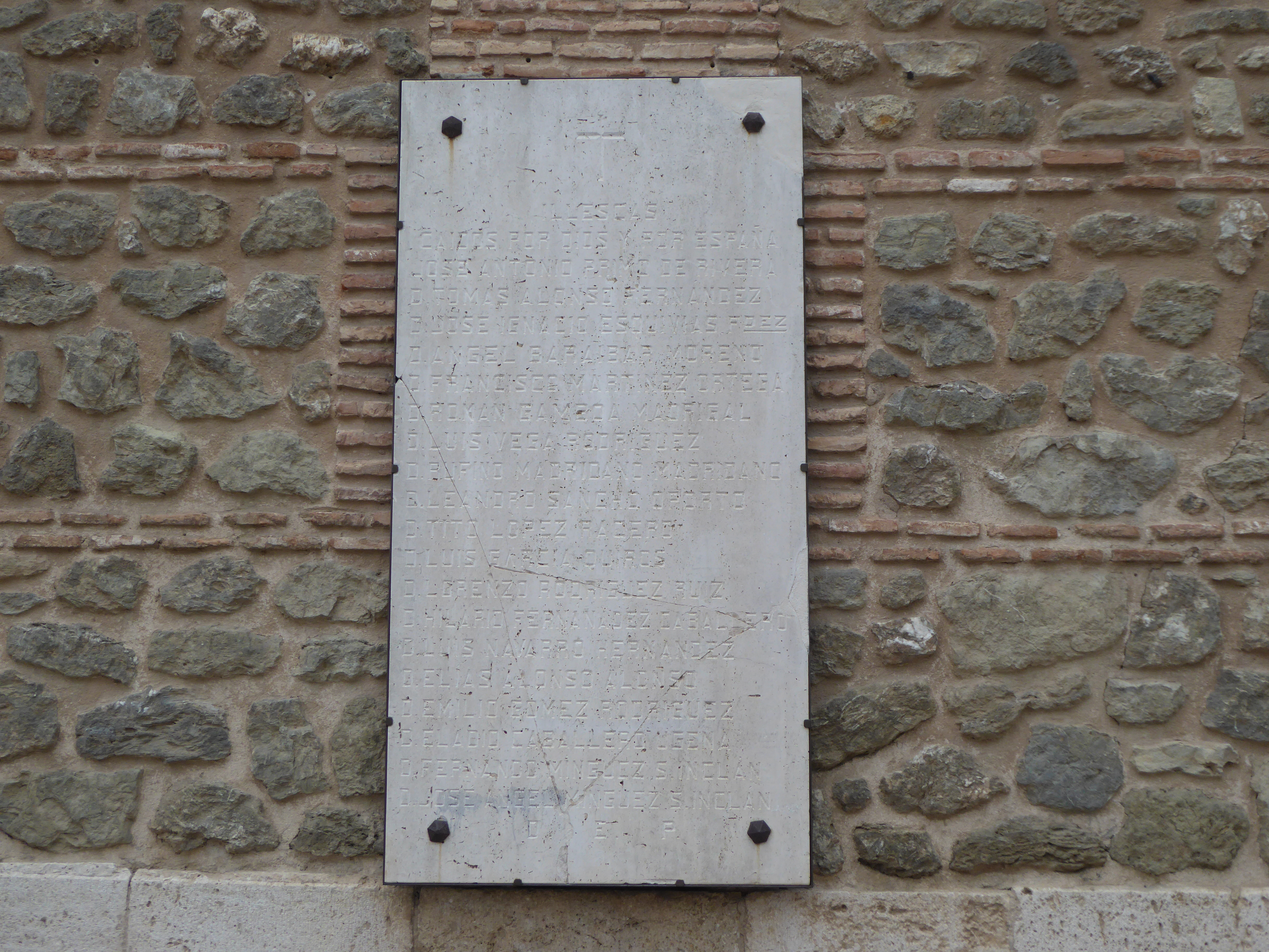 Lápida recordatorio caídos bando nacional 1936-1939, iglesia de Santa María, Illescas, Toledo.